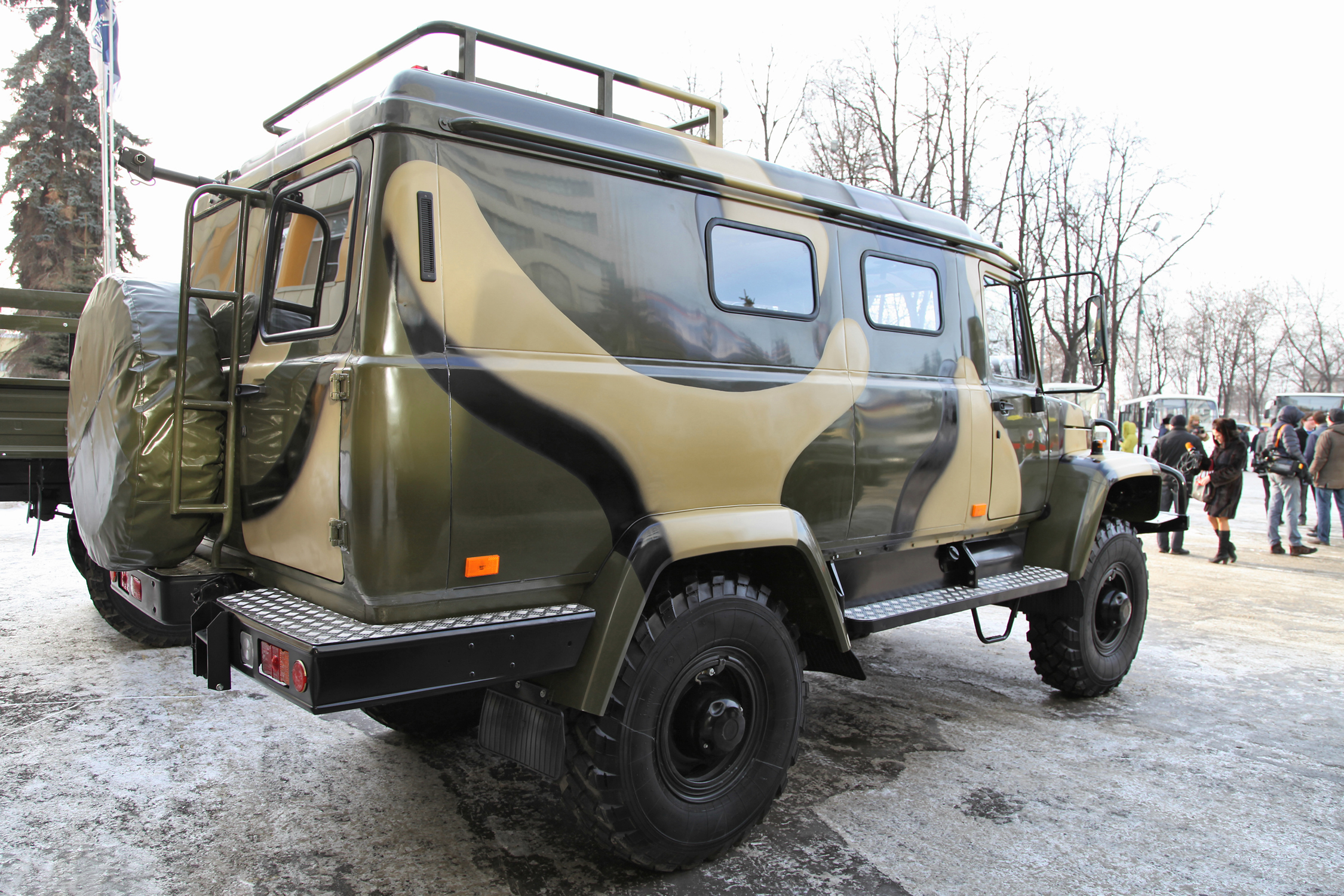 ГАЗ-330811 Вепрь (GAZ-330811 Vepr)